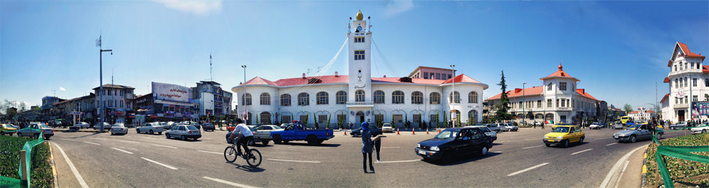 سراسر نما از ساختمان شهرداری رشت